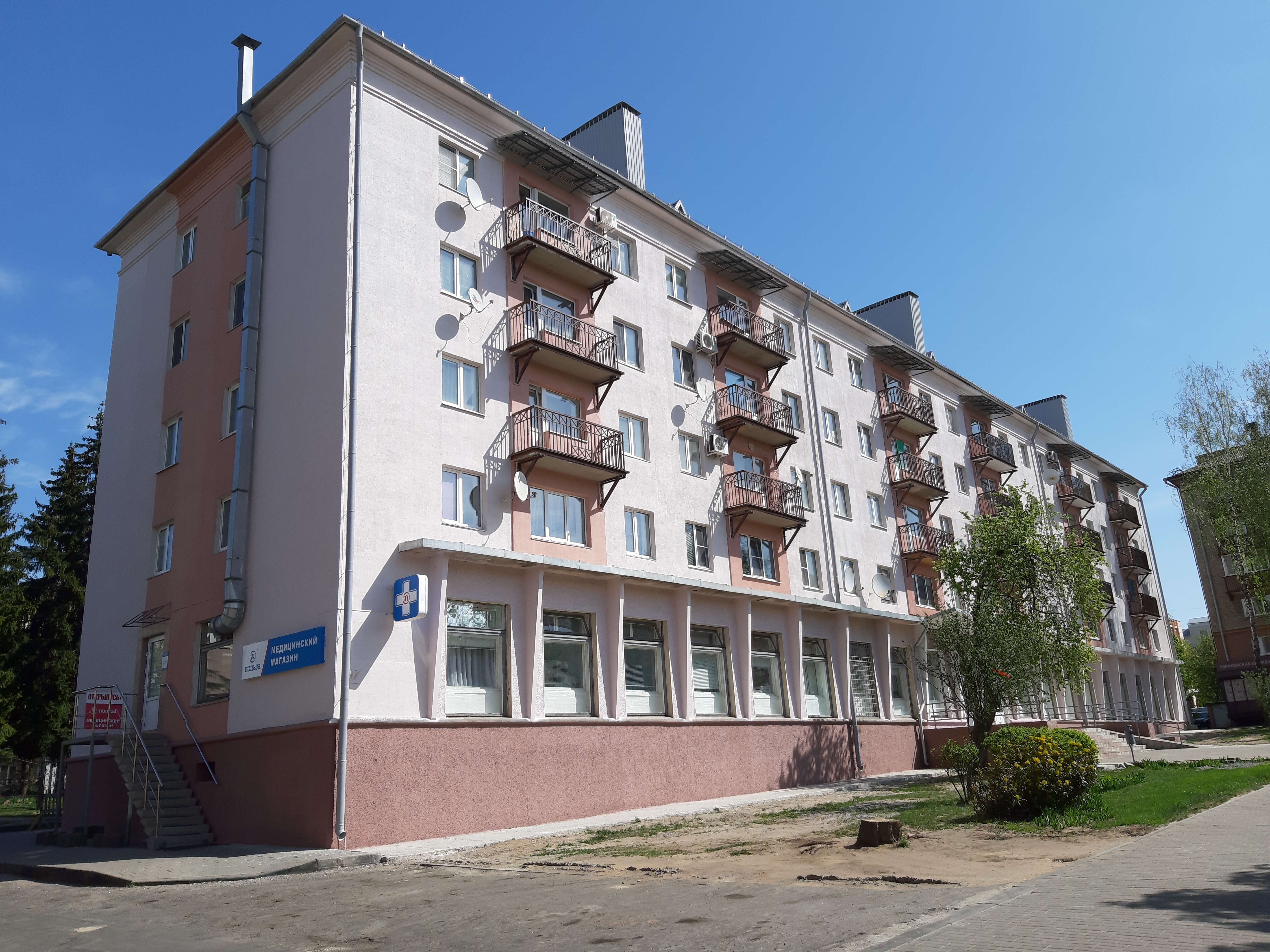 Магілёў. Праспект Міру